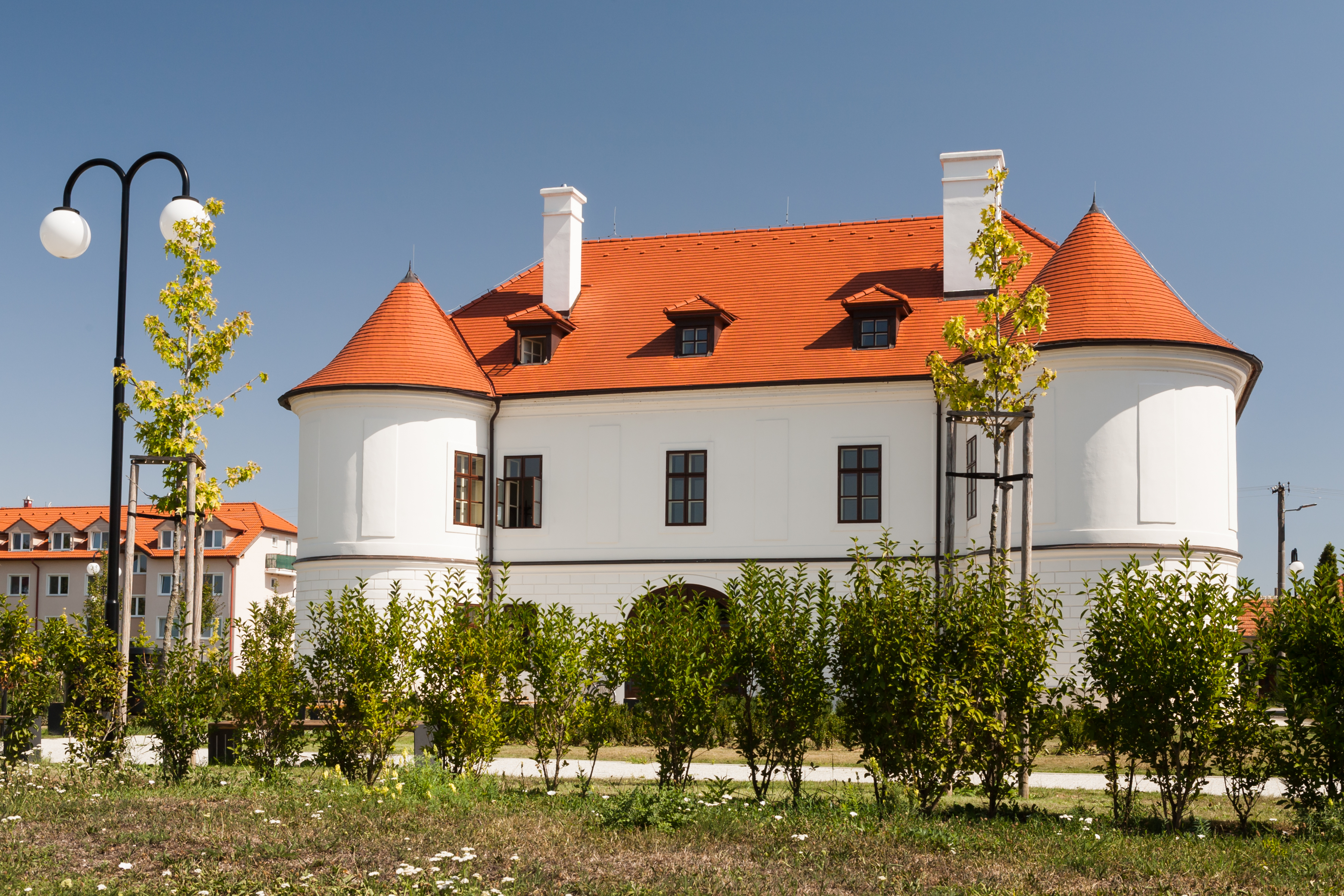 Nehnuteľná národná kultúrna pamiatka kaštieľ